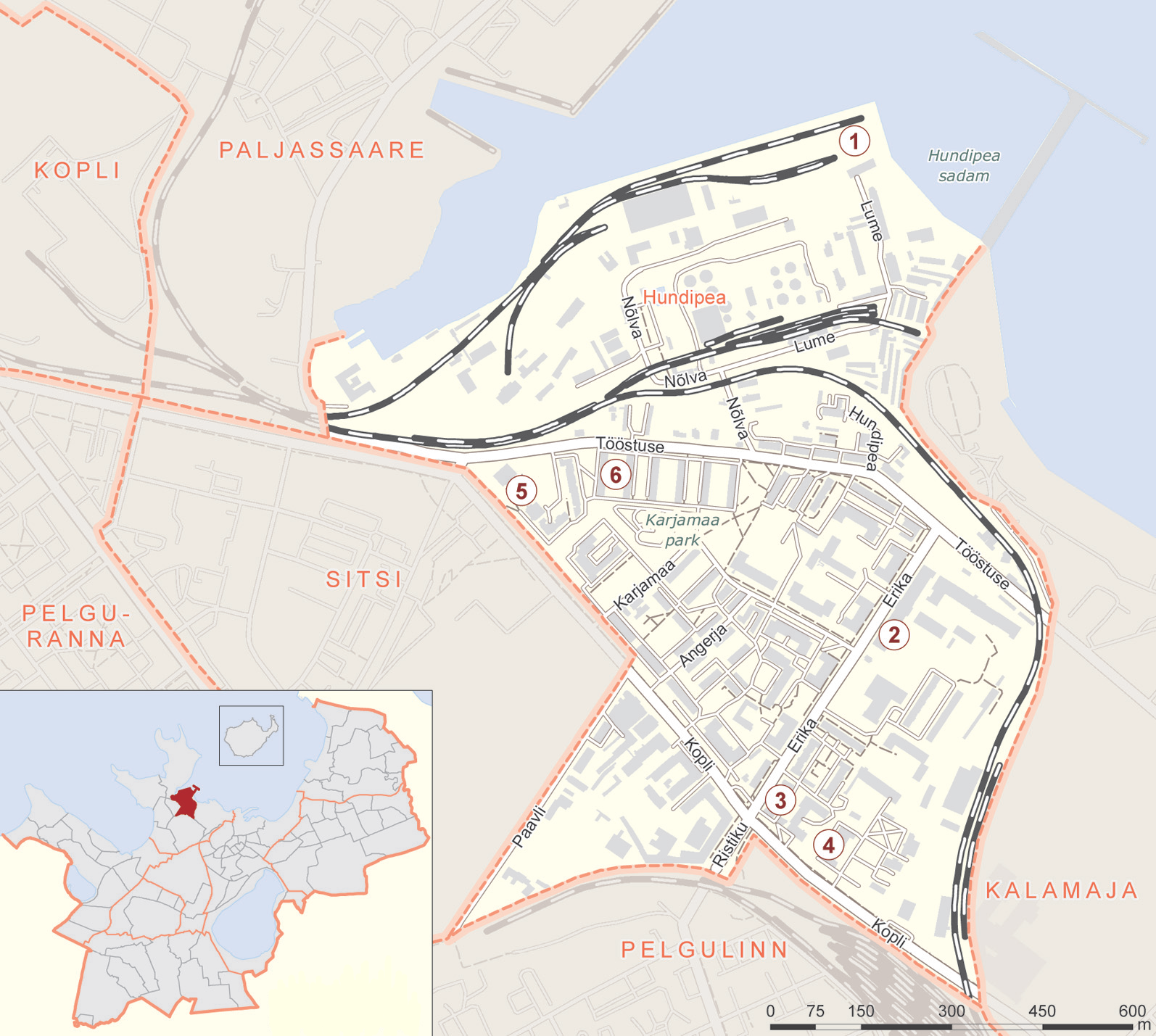 Karjamaa asumi kaart